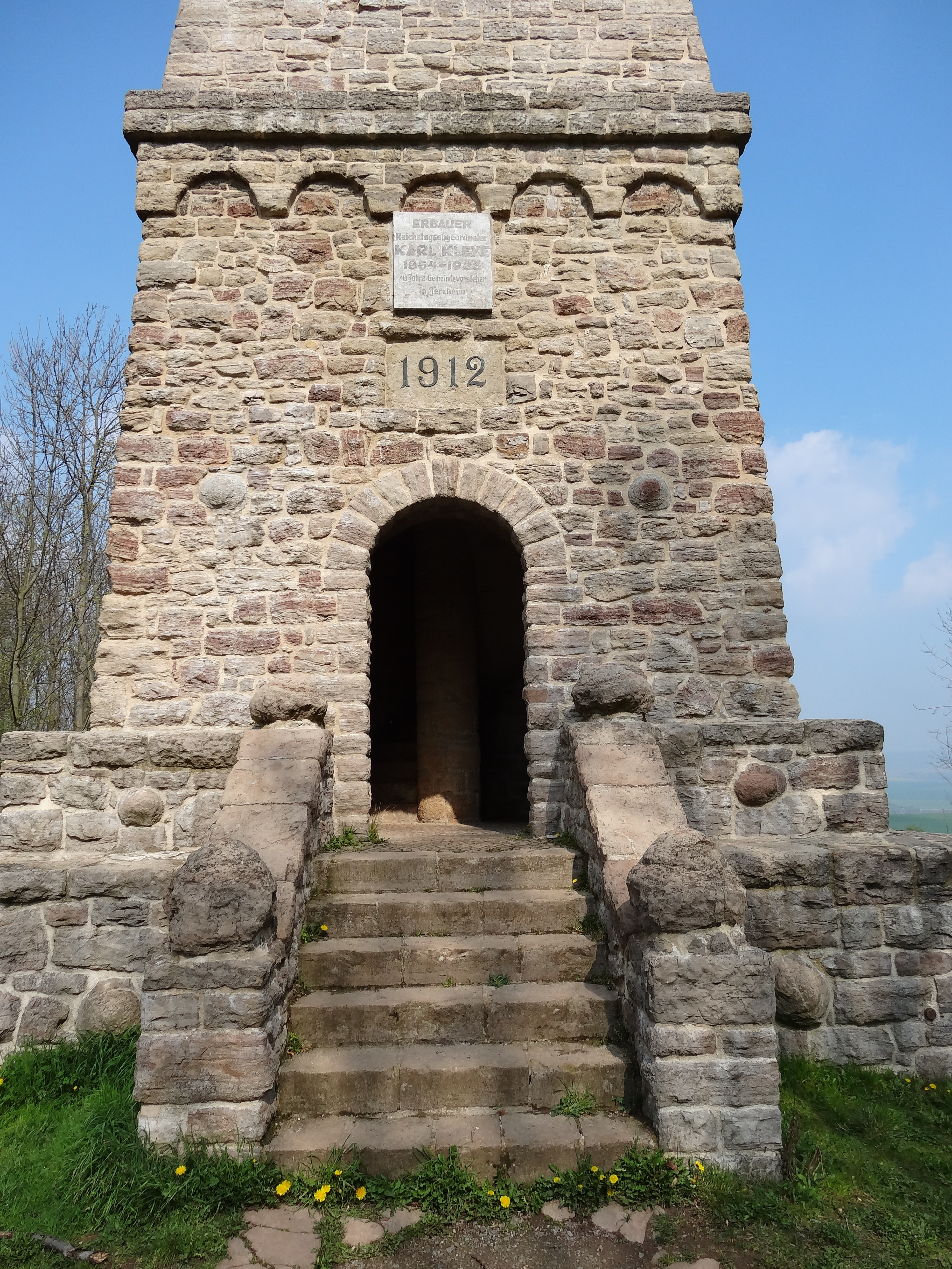 Aussichtsturm am Heeseberg, Kreis Helmstedt, 1912 von Karl Kleye erbaut, Höhe ca. 20 m